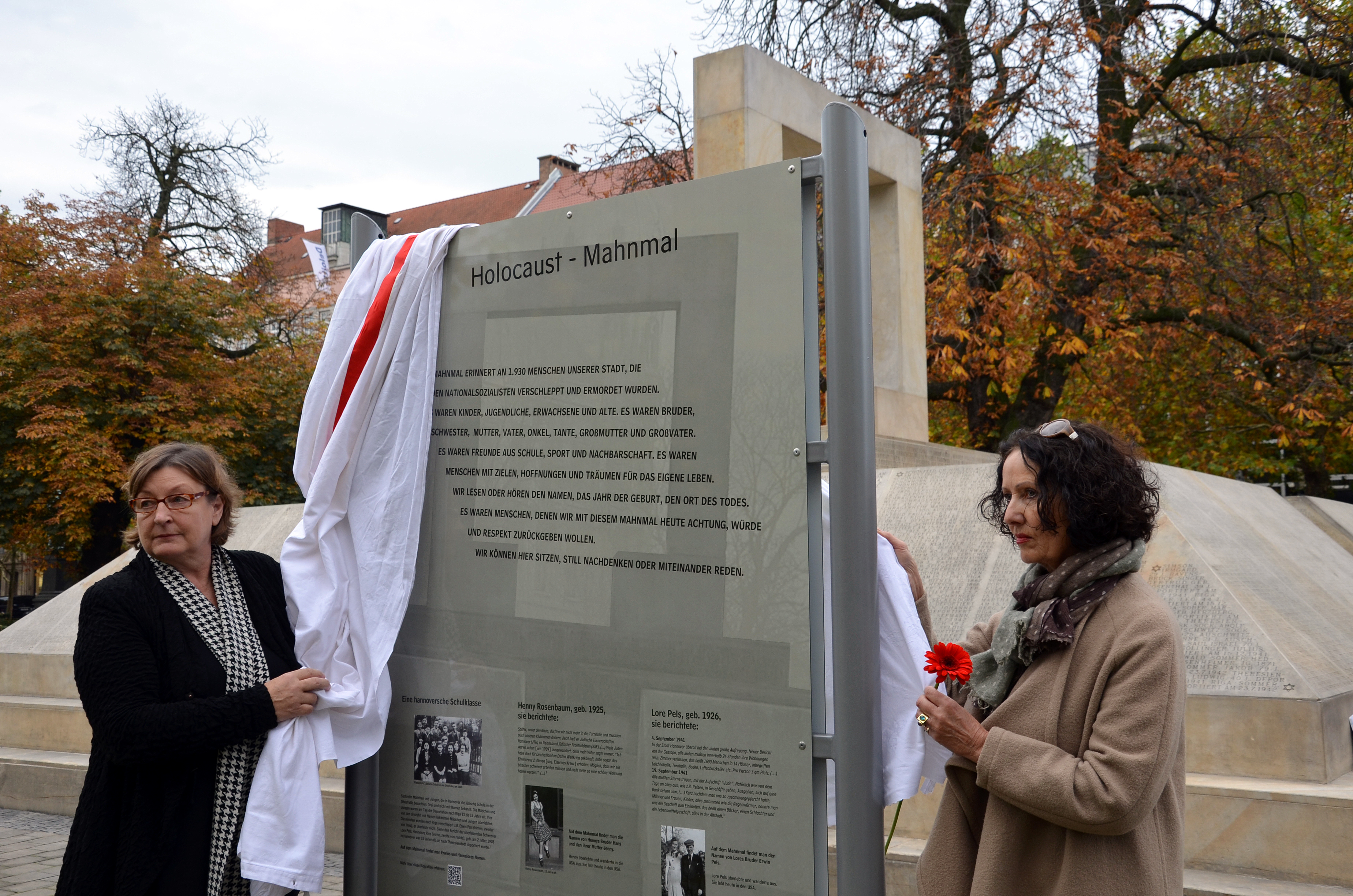 Am 25. Oktober 2013 ab 13.00 Uhr enthüllten Ingrid Wettberg, die Vorsitzende der Liberalen Jüdischen Gemeinde Hannover, gemeinsam mit Hannovers Kultur- und Schuldezernentin Marlis Drevermann, die Informationstafel zum Mahnmal für die ermordeten Juden Hannovers. Begleitet von den Klängen des Musikers Thomas Zander und vorgetragener Inhalte der Tafel durch Schüler der St. Ursula-Schule Hannover nahmen zahlreiche Gäste aus Politik, Kultur und Gesellschaft an der Veranstaltung teil, darunter die Holocaust-Überlebenden Salomon Finkelstein und Henry Korman ...